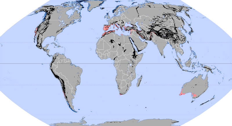 Auszug der Karte Ökozonen nach Jürgen Schultz